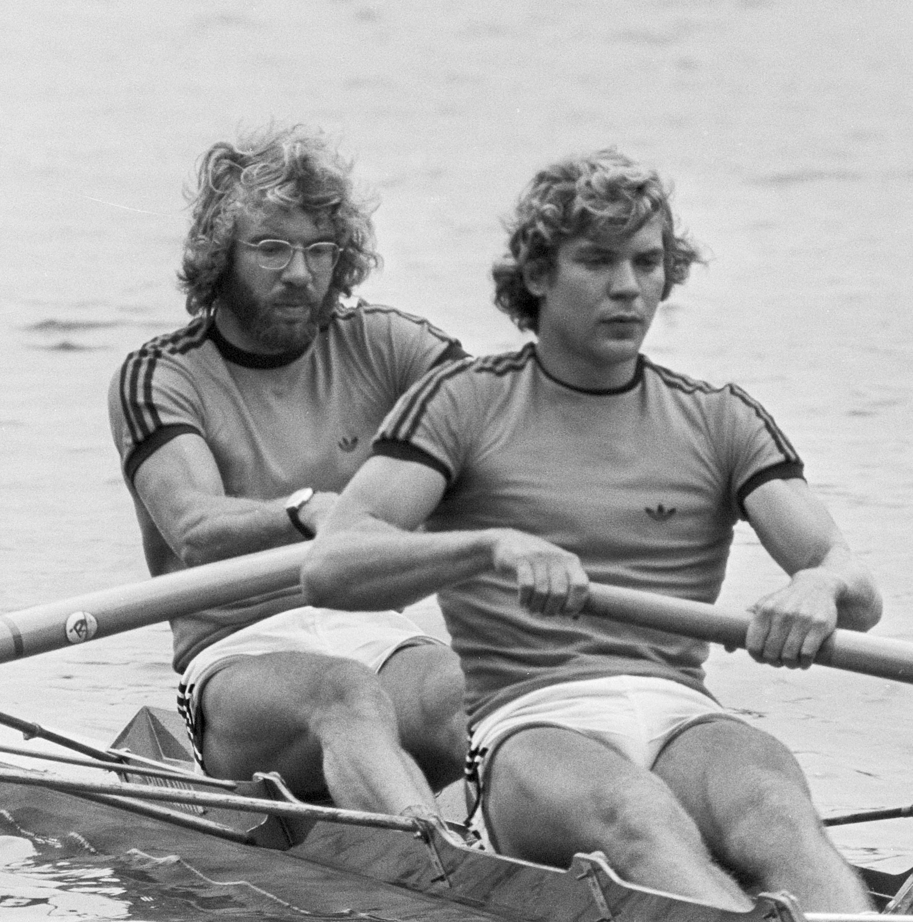 WK roeien op Bosbaan; heren twee zonder Jeroen en Ronald Vervoort